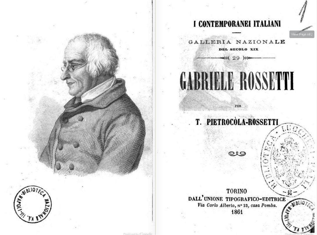 Frontespizio della biografia di Gabriele Rossetti per Teodorico .Pietrocola Rossetti del 1861 tratto da Internet Archive